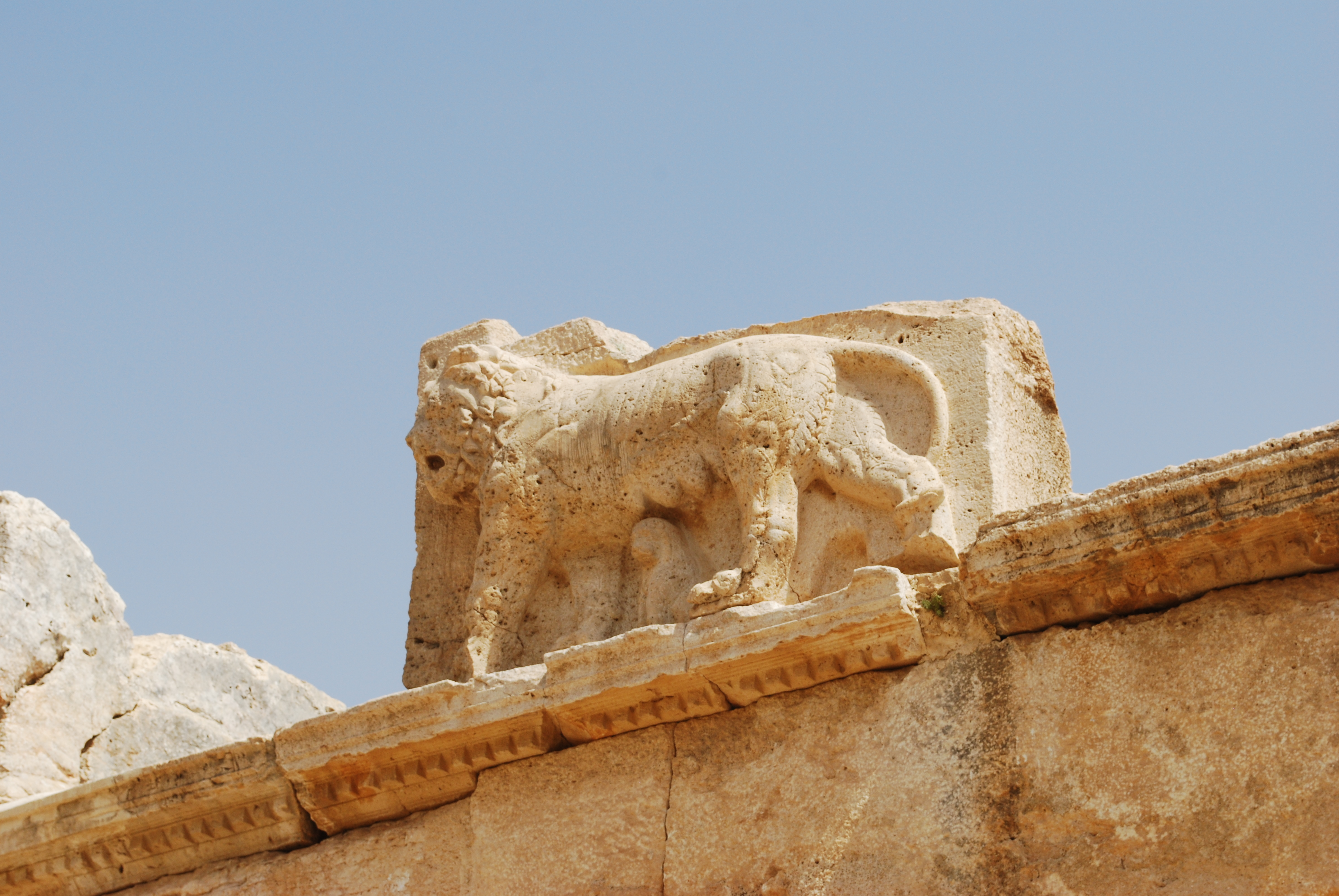 Le château d'Iraq al Amir : détail du côté ouest, lion en relief.